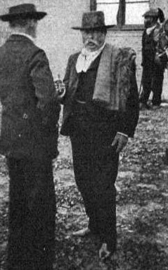 El guitarrista Juan Alais (1844-1914) vestido con atuendo criollo, c. 1900.